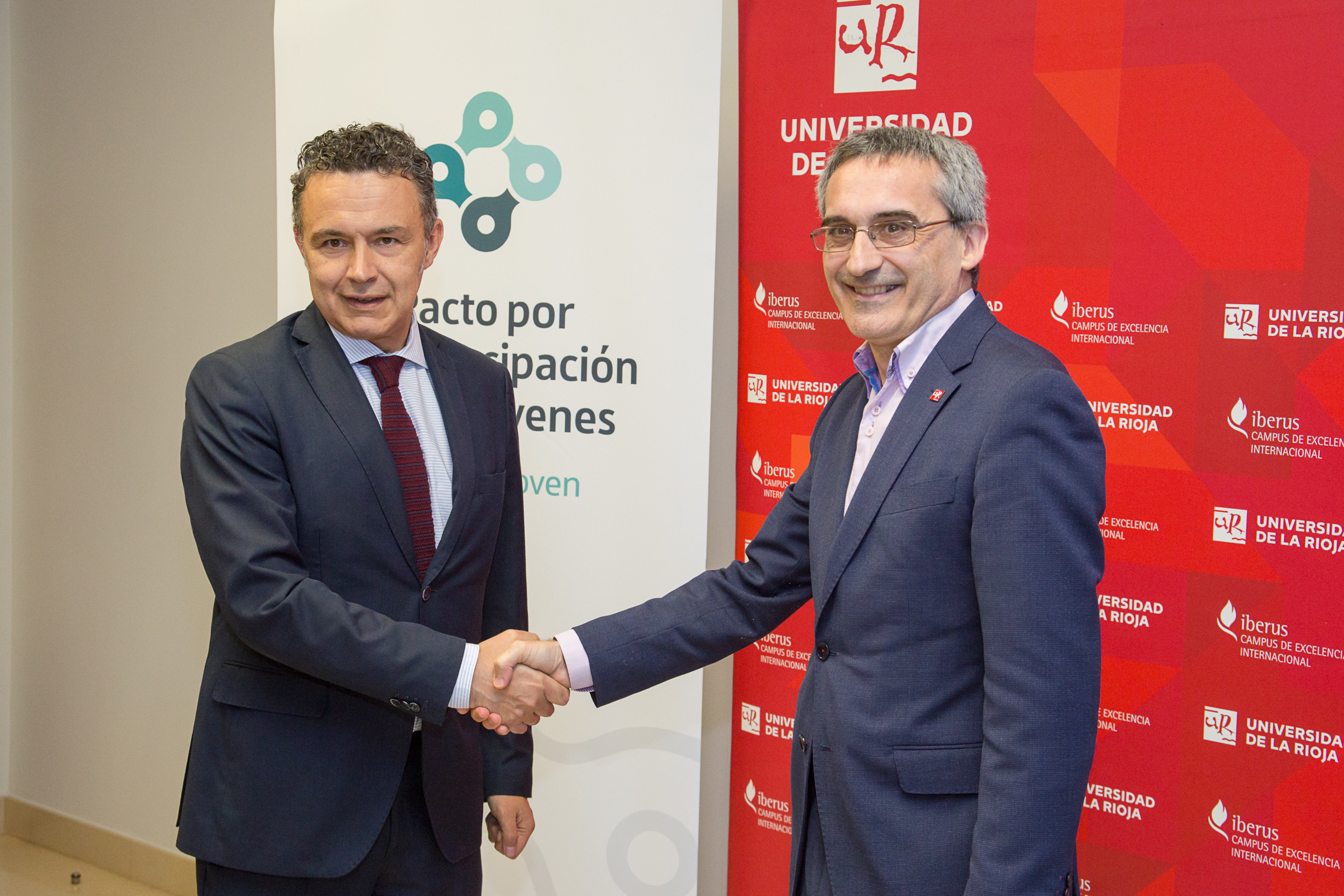 Se trata de una imagen de archivo de la Universidad de La Rioja, libre de derechos, del día en el que se firmó el acuerdo entre el Gobierno de La Rioja y la Universidad de La Rioja para colaborar conjuntamente en el marco del Pacto por la Emancipación de los jóvenes de La Rioja.